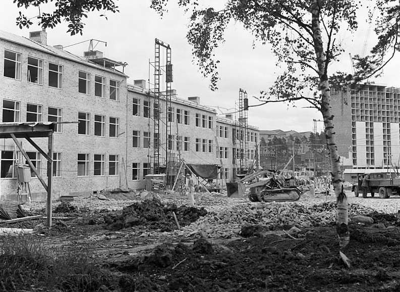 Hässelbygårdsskolan under uppbyggnad.